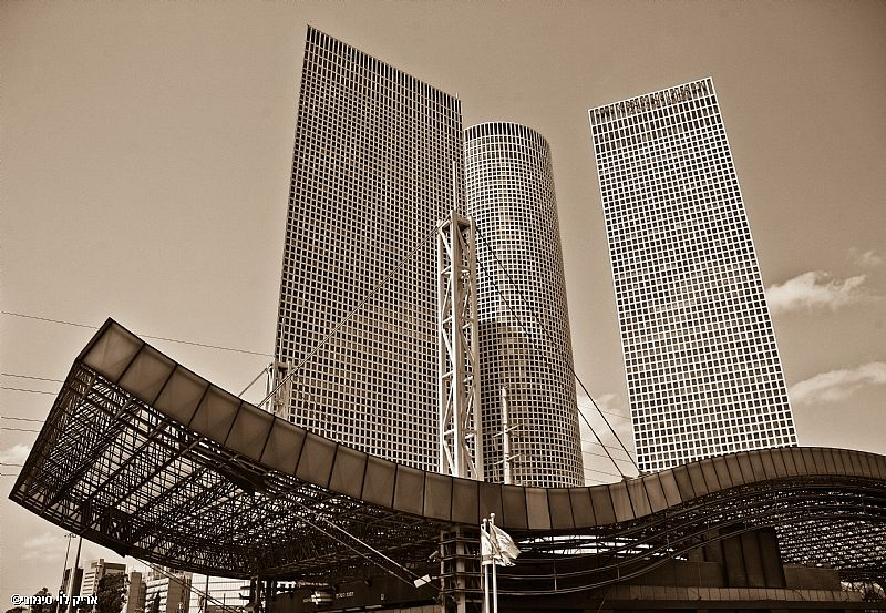 מגדלי עזריאלי וגג תחנת הרכבת